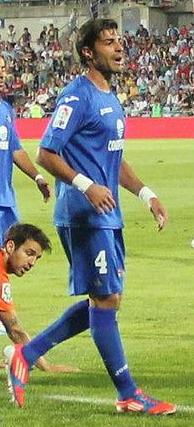 Miguel Torres durante la disputa del Getafe CF vs FC Barcelona en 2012.